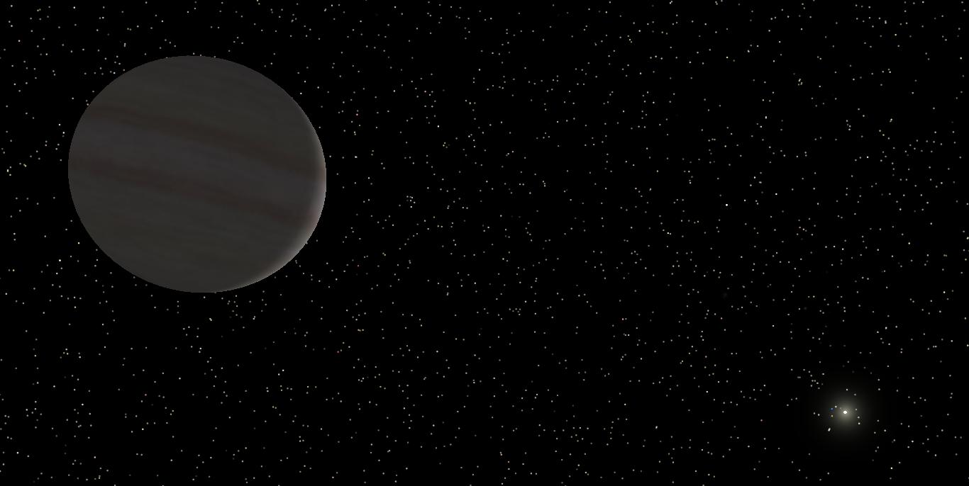 Ésta es una imagen del planeta Upsilon Andromedae e